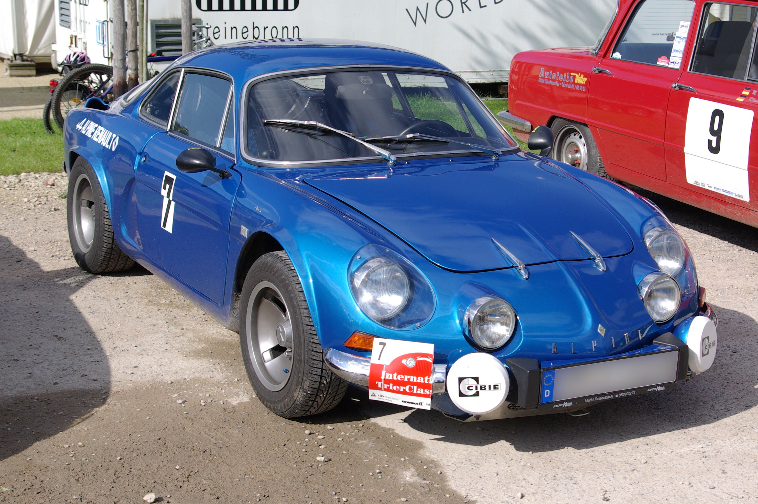 Alpine Renault berlinette 1600 SX A110 Baujahr 1977 fotografiert bei "Internationale TrierClassics 2008" [1]